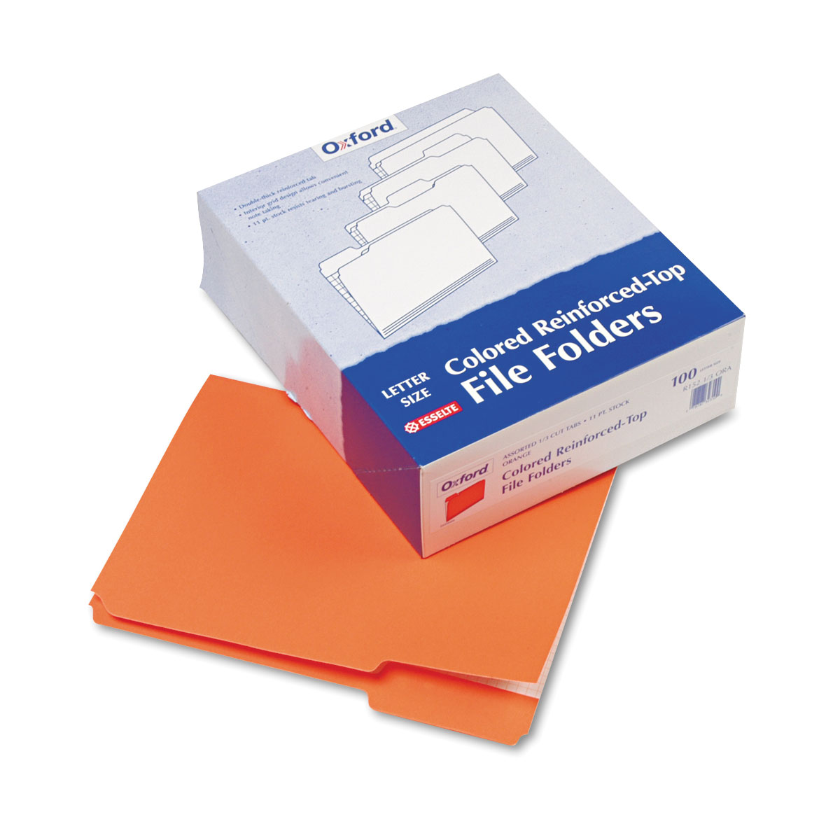 Orange File Folders